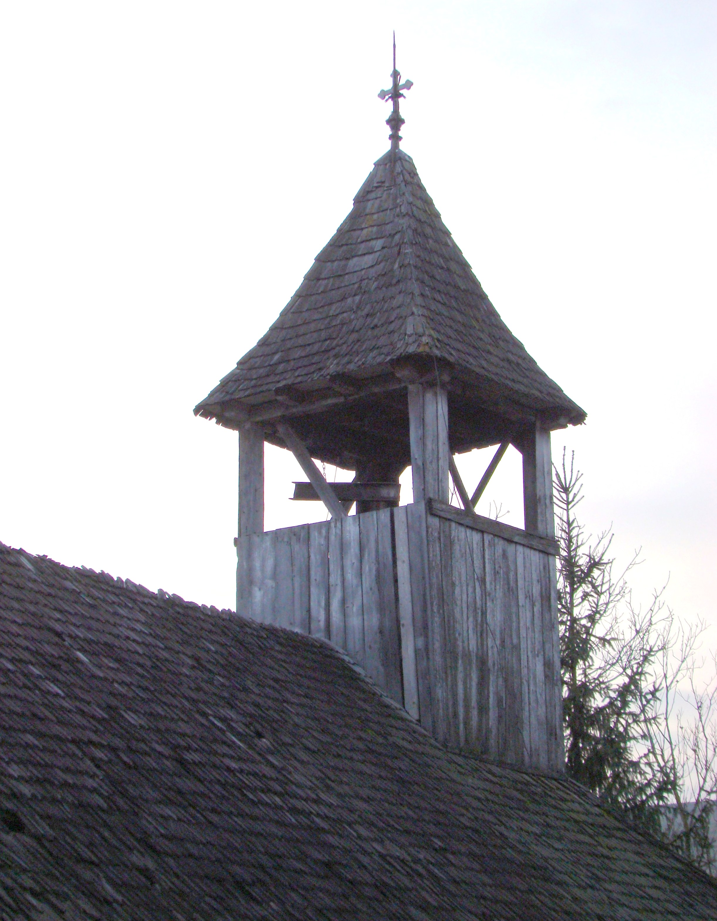 Biserica de lemn „Sf.Arhangheli” din Mădărășeni, județul Mureș